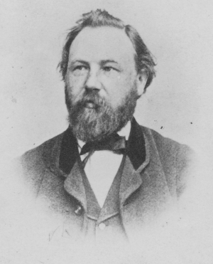 Oskar Pichler Foto von J. Schäfer